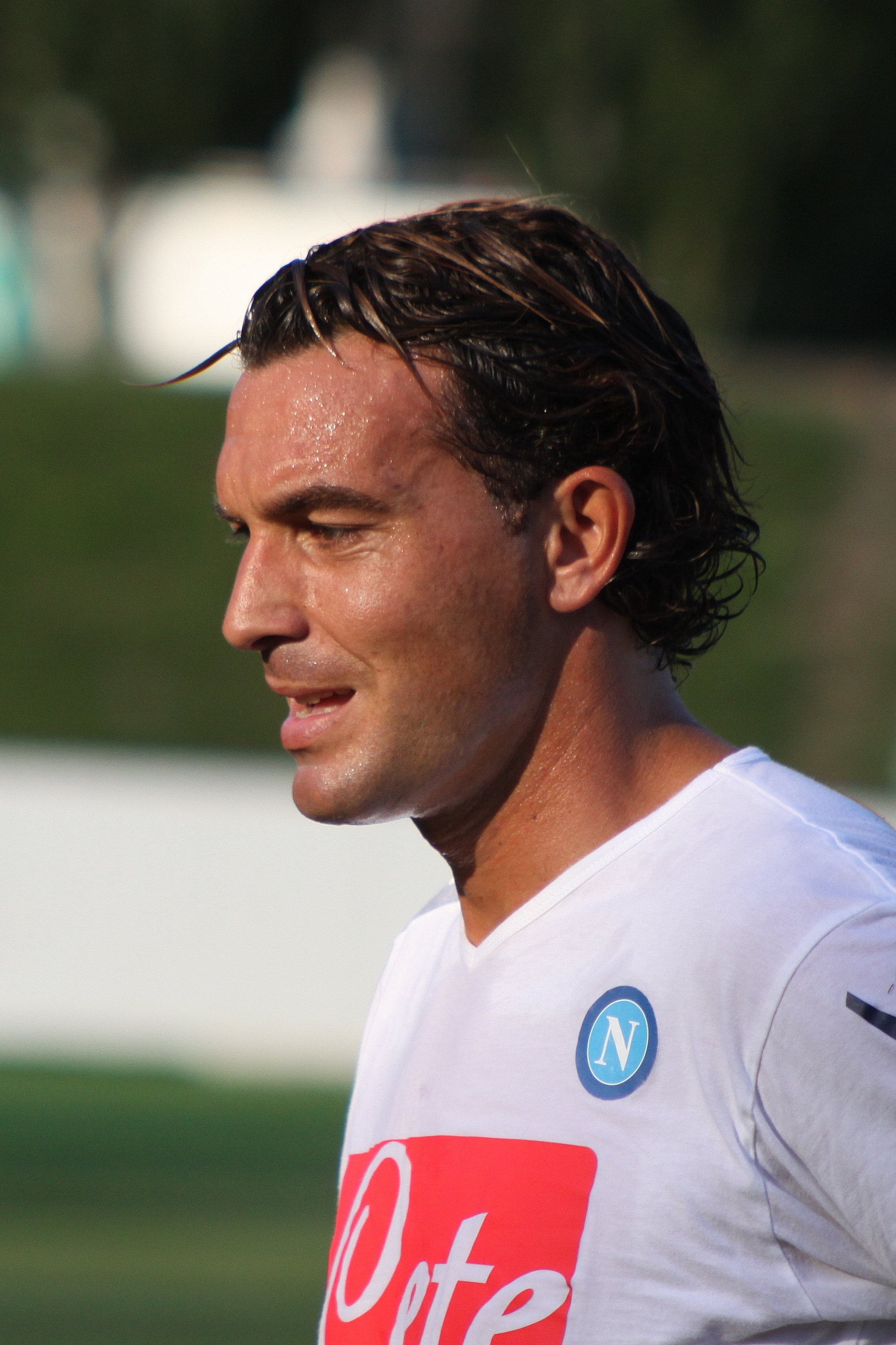 Salvatore Aronica - SSC Neapel (1) Salvatore Aronica - Società Sportiva Calcio Napoli